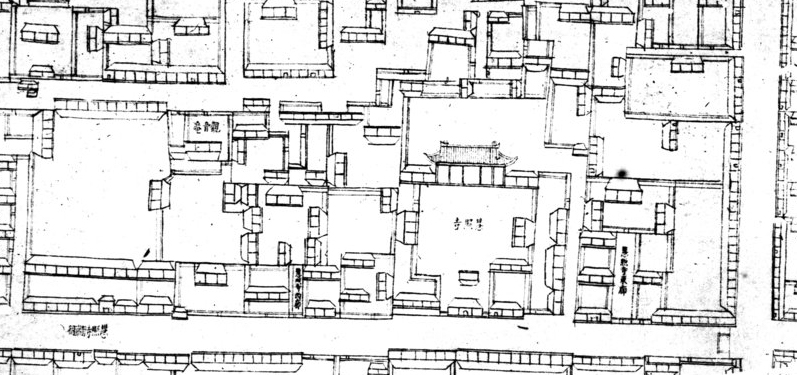 乾隆十五年（1750年）完成的《乾隆京城全图》中的慧照寺及其附近地区。本图来自清內務府藏京城全圖，故宮博物院影印，民國二十九年十二月（1940年）。